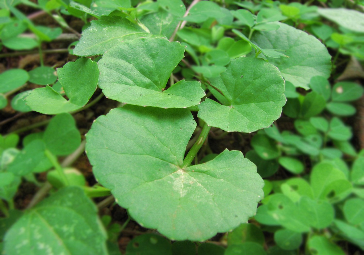 കുടകൻ എന്ന ഔഷധസസ്യത്തിന്റെ ചിത്രം